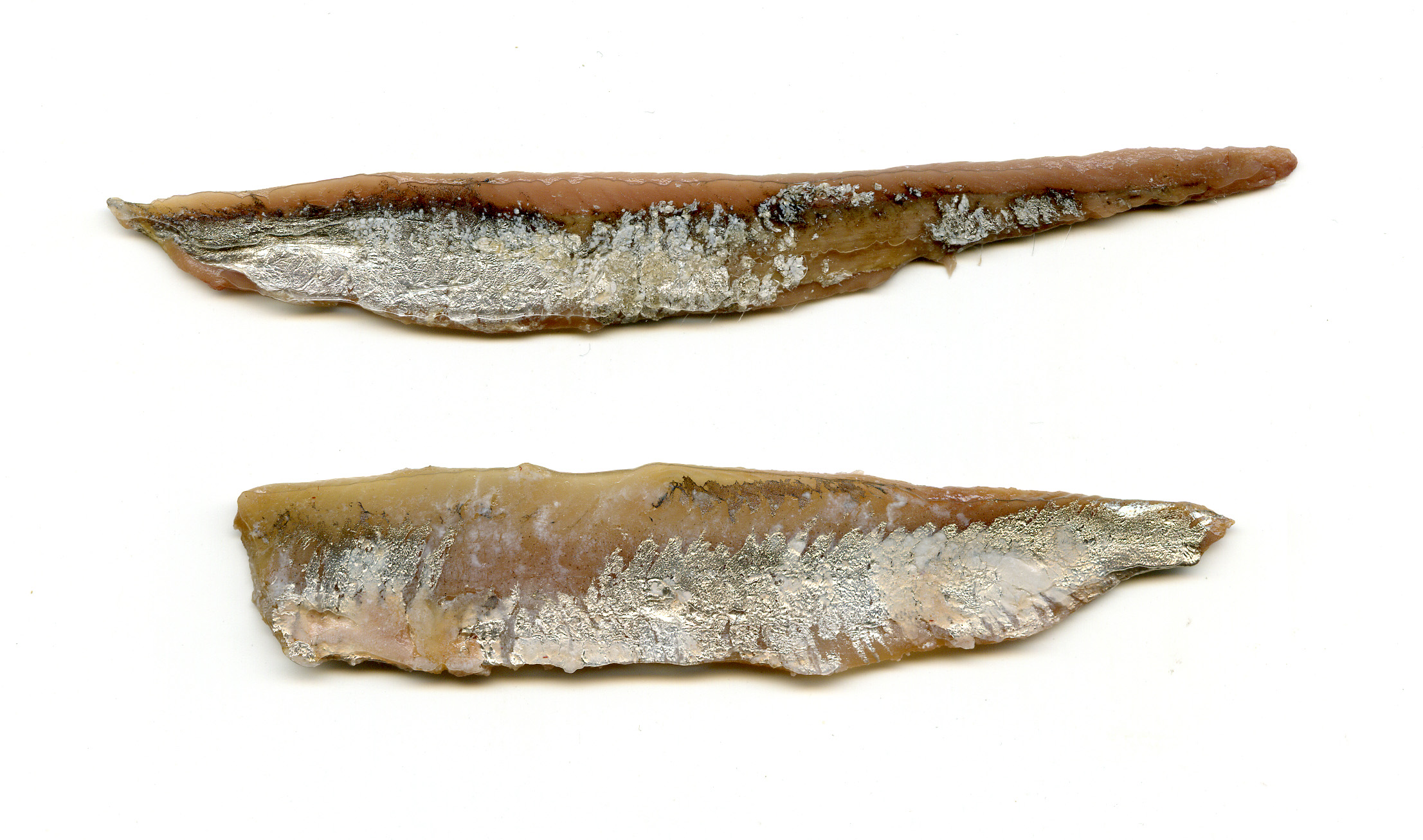 Anchovis: oben echte Anchovis aus Sardellen, unten unechte aus Sprotten. Eigene Aufnahme